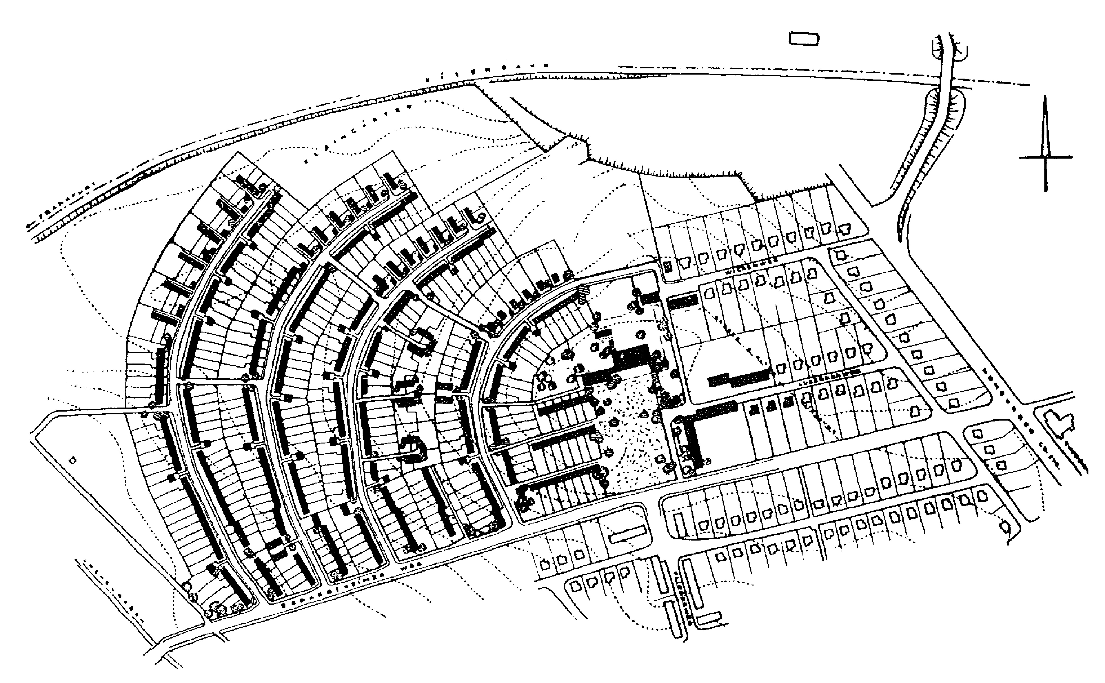 Plan der Siedlung Frankfurter Berg Teilbereich Bizonale Siedlung aus den 1940er Jahren